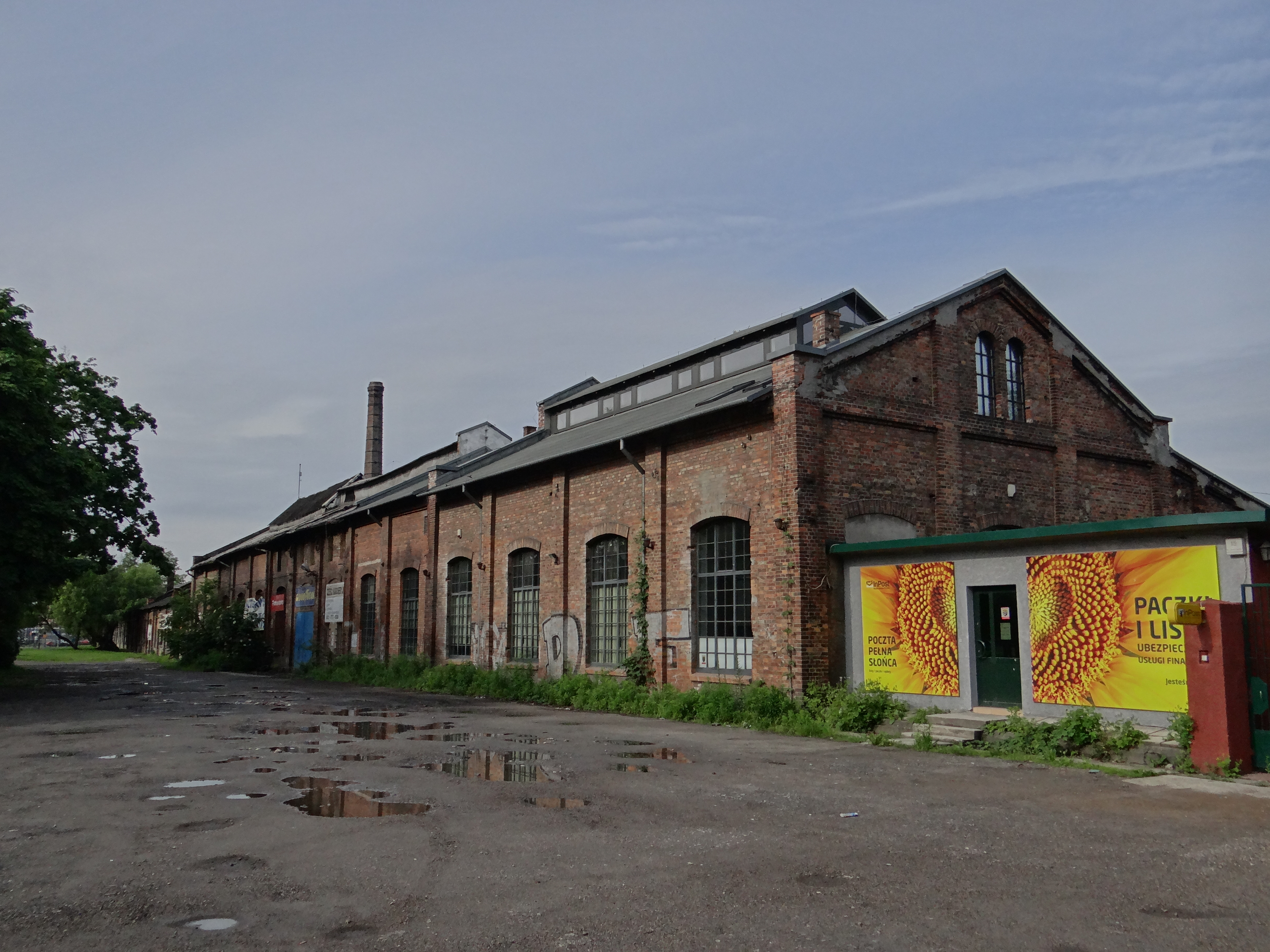 Kraków, hala fabryczna II, 1889-1905